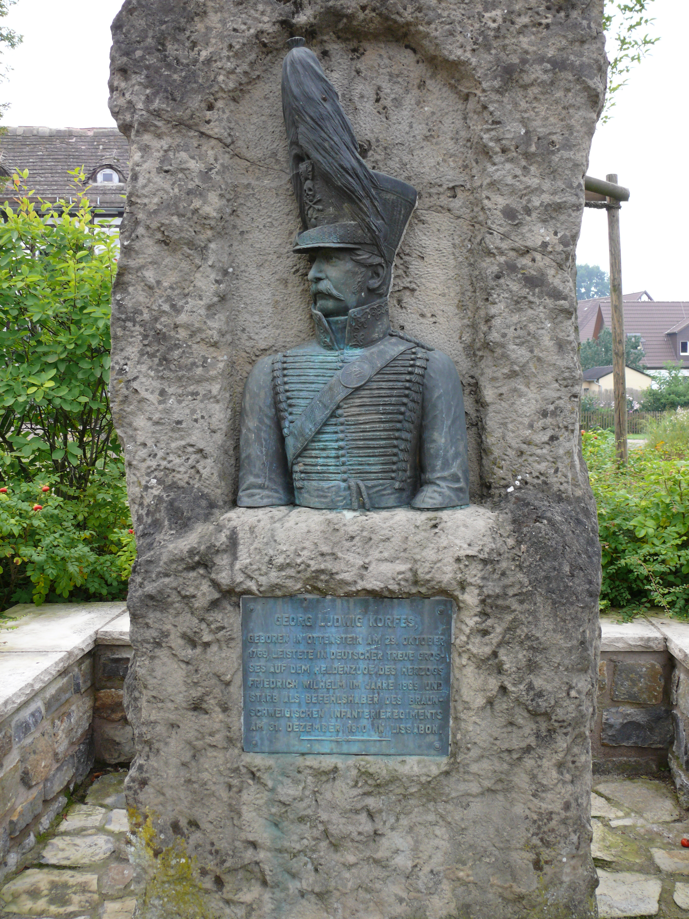 Korfes-Denkmal in Ottenstein (Niedersachsen)